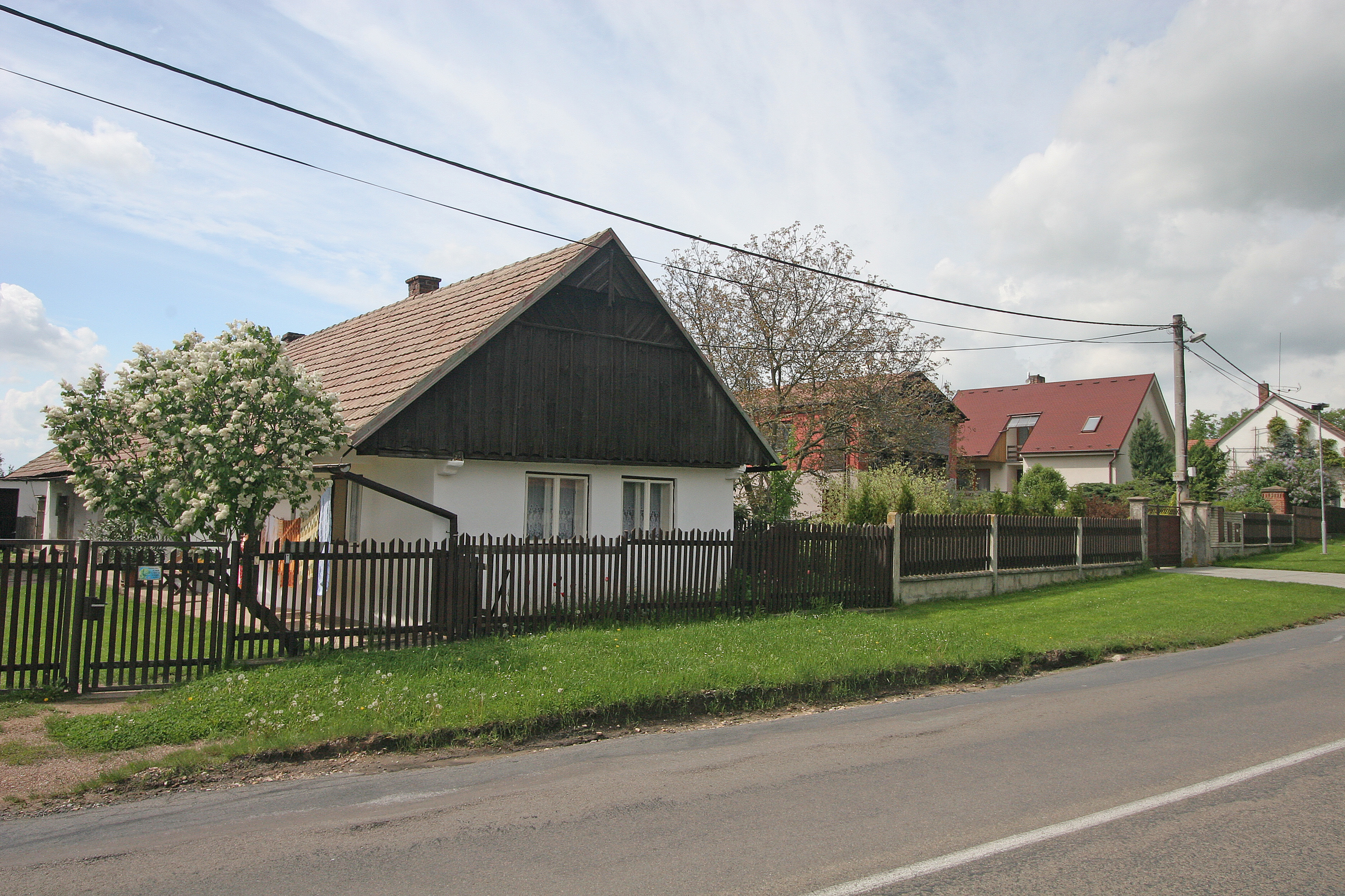 Zadražany čp. 21